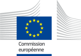 Logo de la Commission européenne, en français